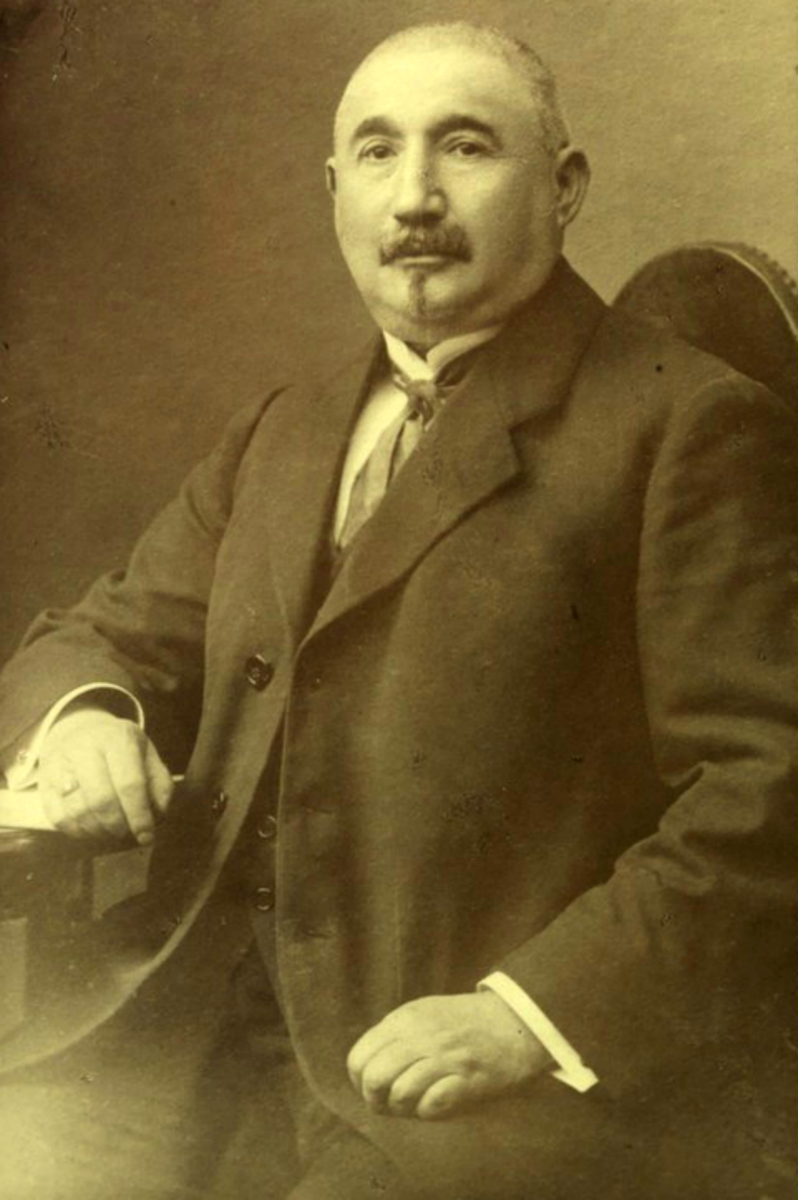 תצלום שחור לבן, תצלום רפרודוקציה של דיוקן הורוויץ, בישיבה: גווני חום, 9X14 ס"מ. בגב התצלום נכתב בעפרון, כי תצלום זה הנו העתק מן המקור אשר נמצא ברשות הסופר שמואל ליב ציטרון, והוא הופק בעיר וילנה בשנת 1924. יש להניח כי המקור צולם בעשור הראשון של המאה העשרים.